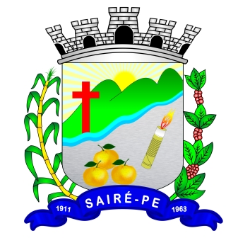 Brasão do Municipio de Sairé